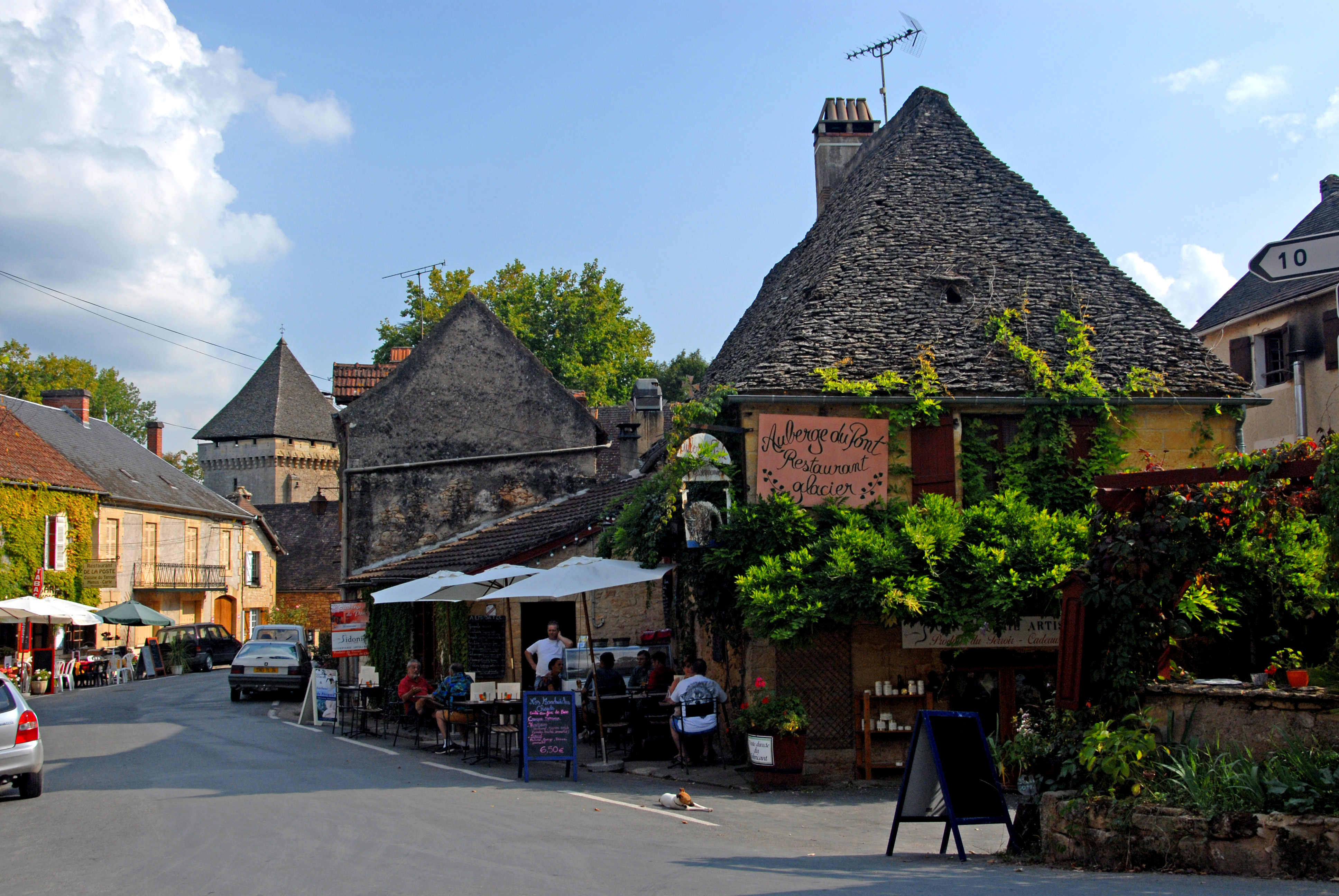 Hauptstraße, links Manoir de la Salle